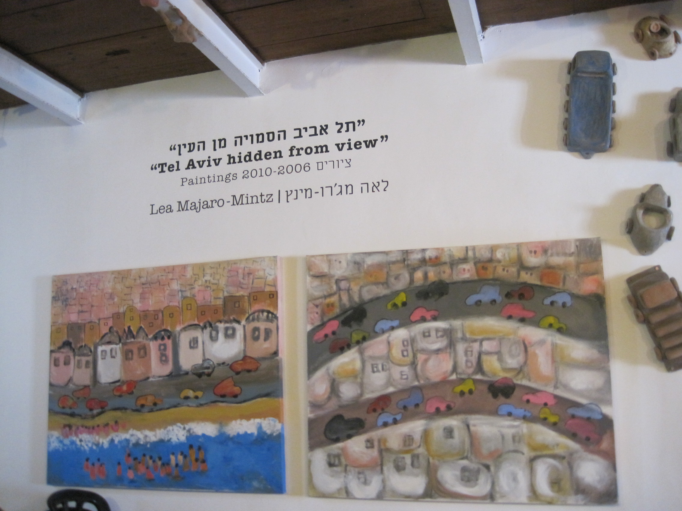 בית שמעון רוקח (בית הש"ר) ברח' רוקח בתל אביב